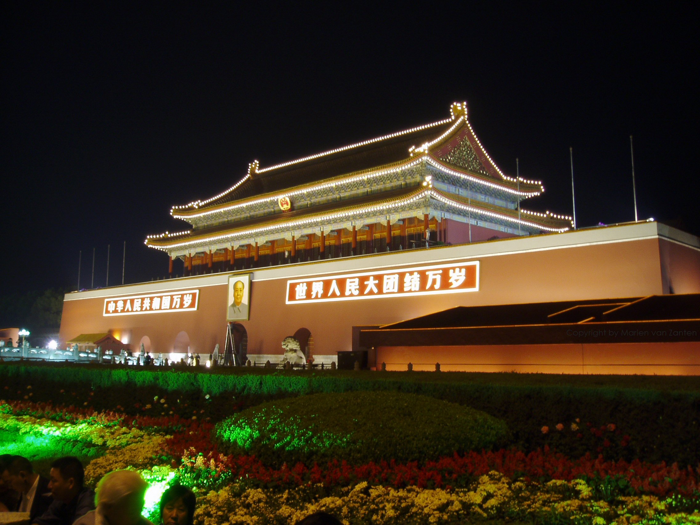 Deze foto is eind september 2003 door mij gemaakt op Het Plein van de Hemelse Vrede (Tian an Men Square) in Beijing (Peking) Gebruikmaking van deze foto is vrij. ® 2005 NiHao Software by Marien van Zanten [1]